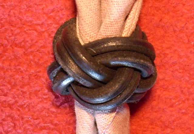 Kravattenknoten mit Türkenbund aus Leder, auch "Gillwell-Knoten"